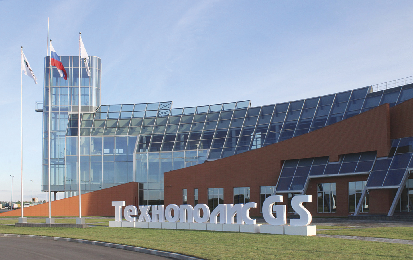 Здание завода GS Nanotech